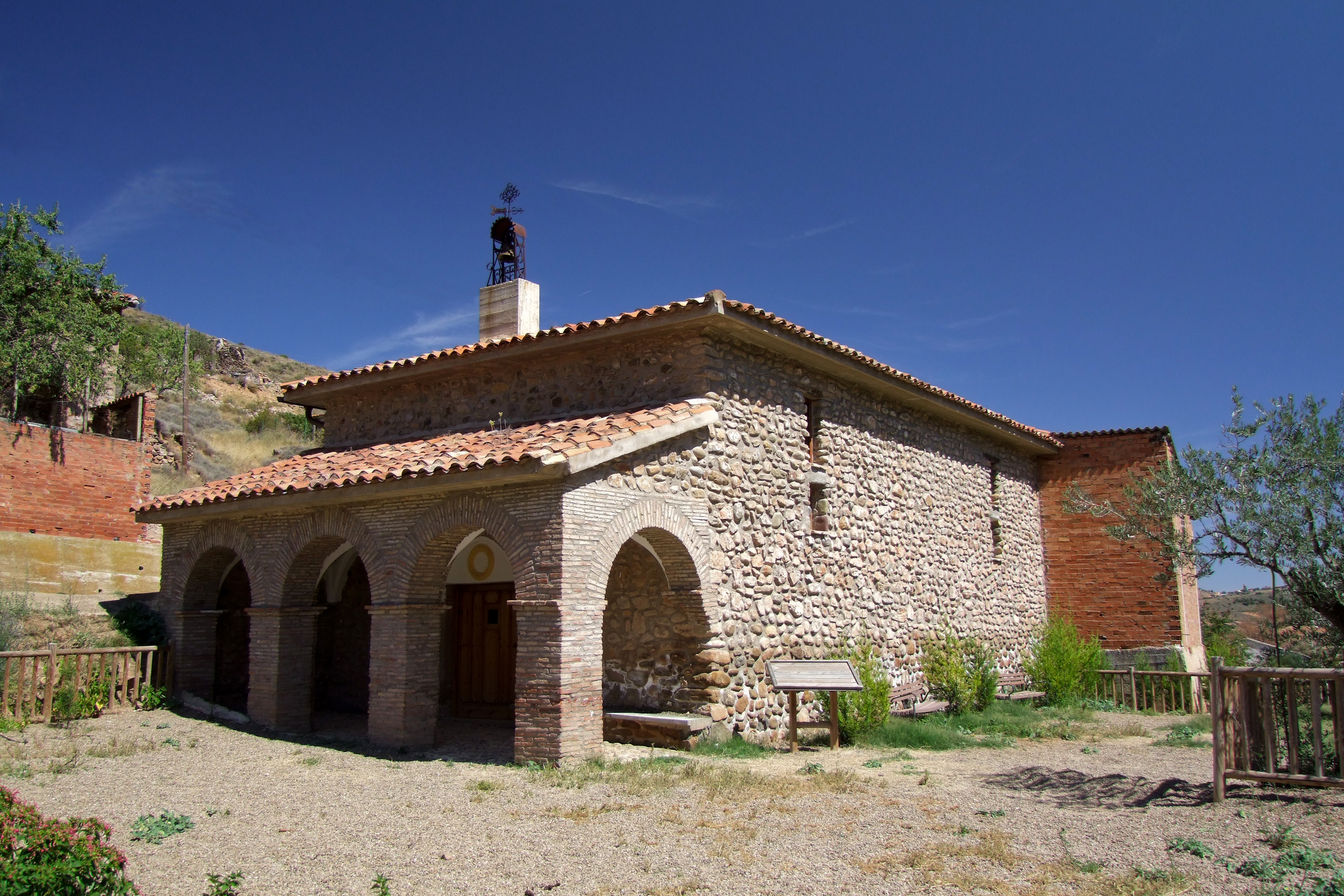 Ermita de San Juan Bautista en la localidad de Santa Engracia de Jubera, La Rioja - España